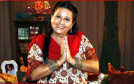 foto de una actriz